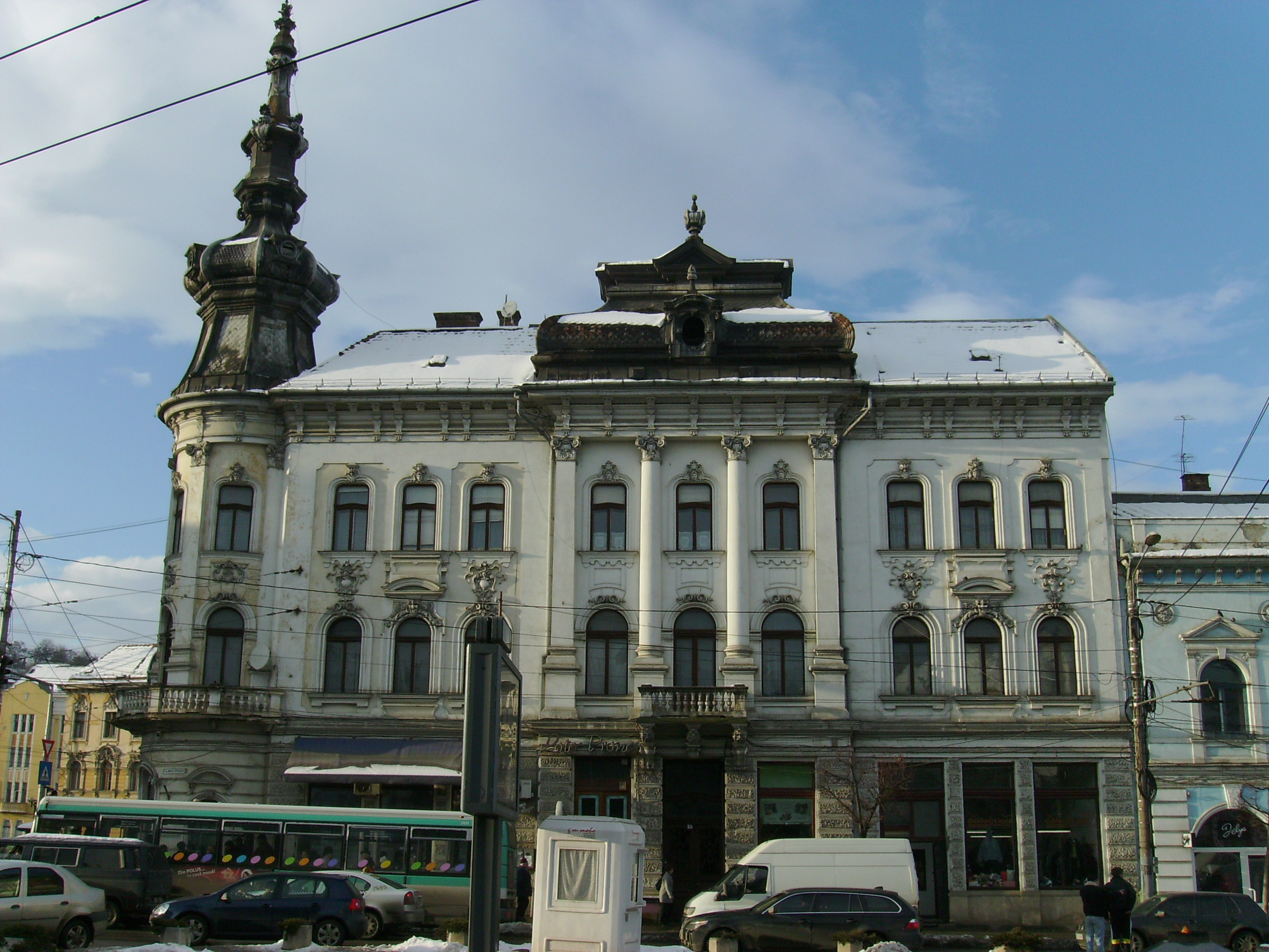 Cluj-Napoca, Palatul Babos, str.Regele Ferdinand nr.38